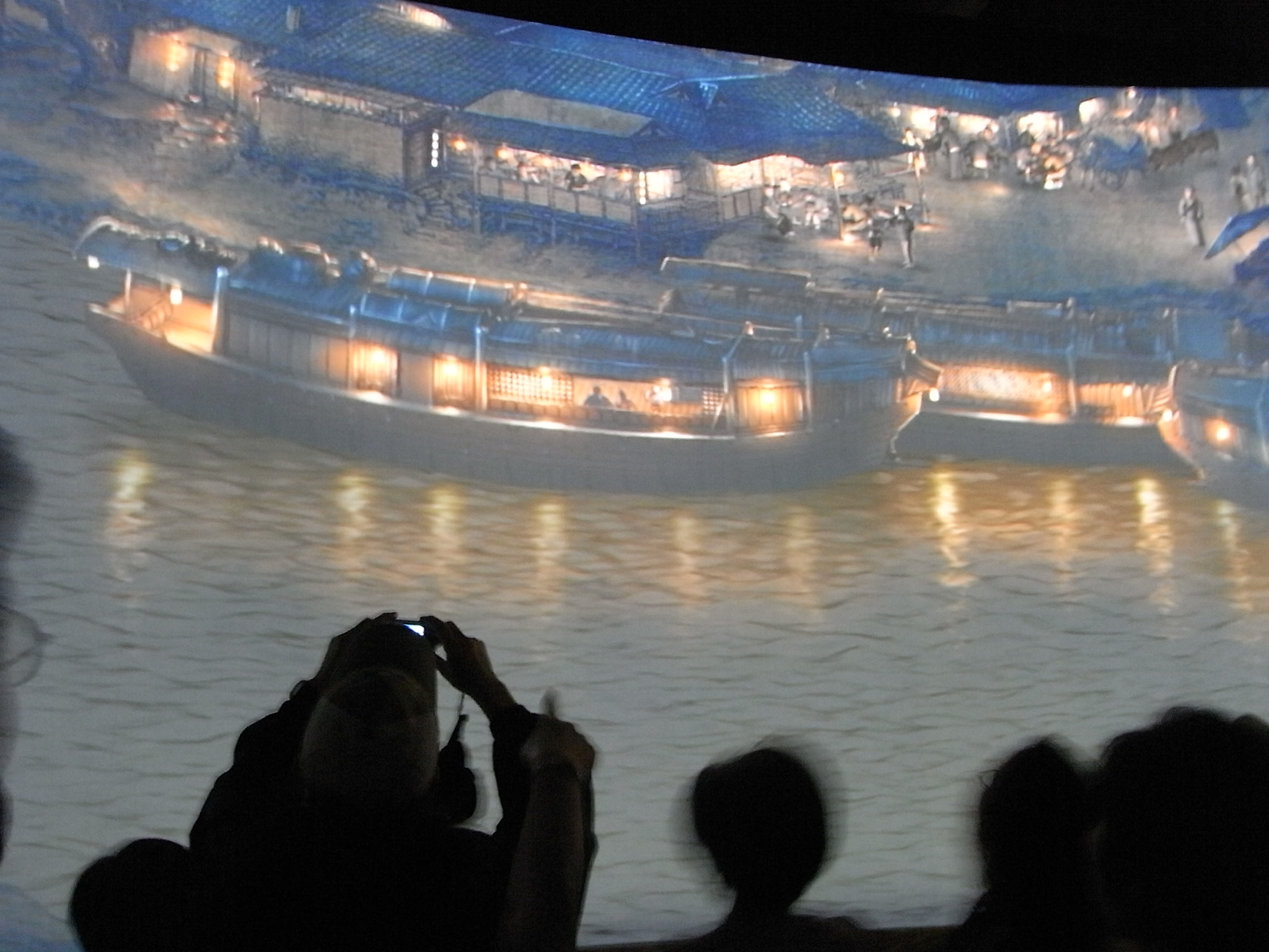 2010年11月 - 清明上河圖（電子動態版）在香港亞洲國際博覽館